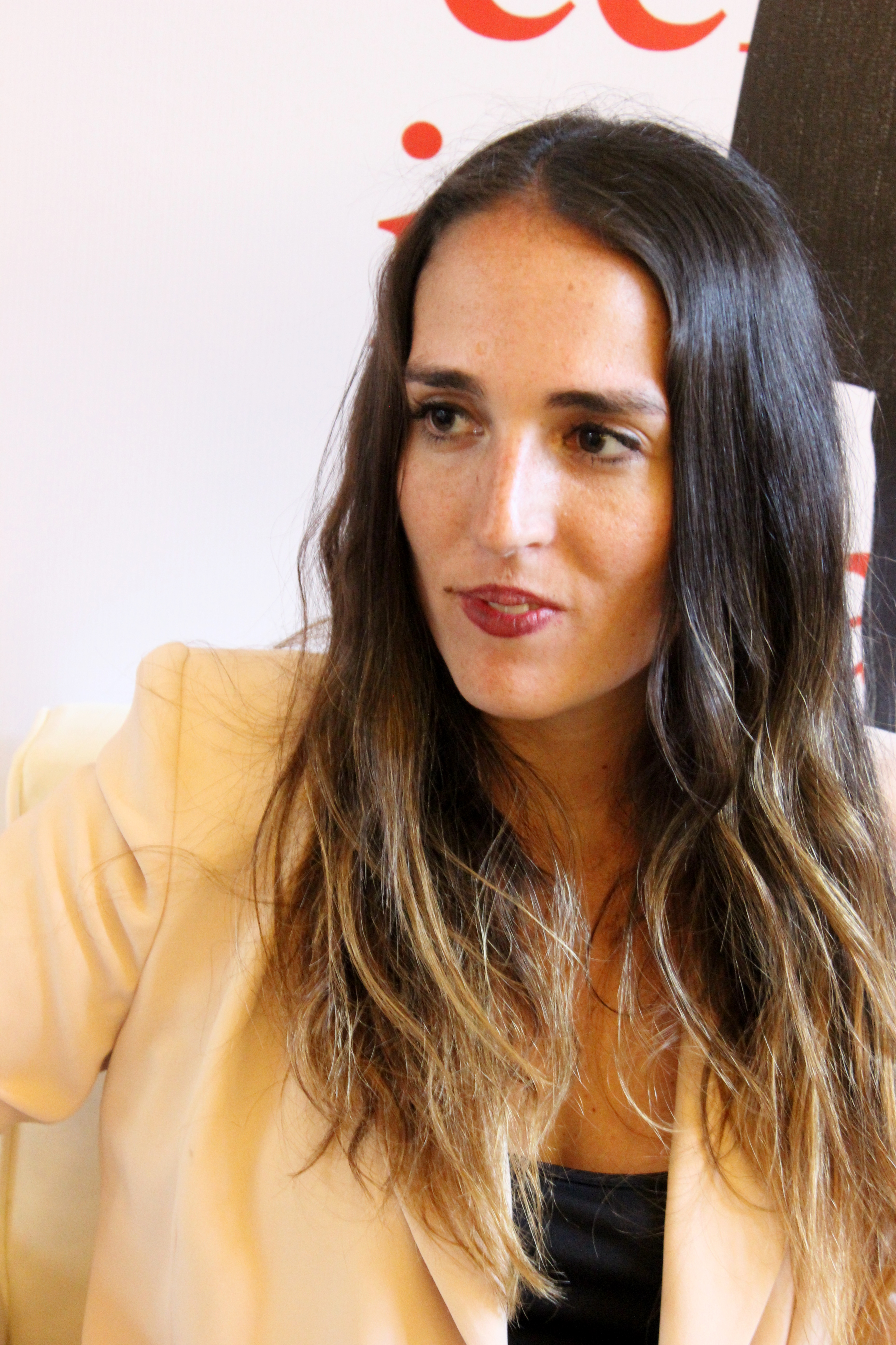 La escritora chilena Montserrat MartorellMontserrat Martorell durante el diálogo Familia, tradiciones y decadencia (en el que participó la novelista ecuatoriana Mónica Ojeda) celebrado en la Feria Internacional del Libro de Santiago 2018 (sala Lily Garafulic, 7 de noviembre).